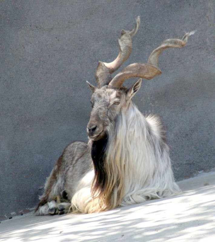 Turkomen Markhor